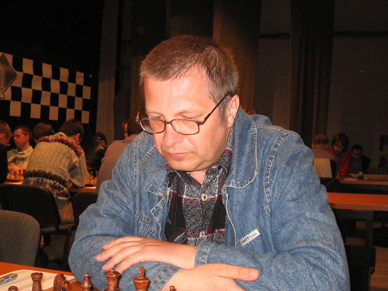 Zbigniew Szymczak, Barlinek 2006